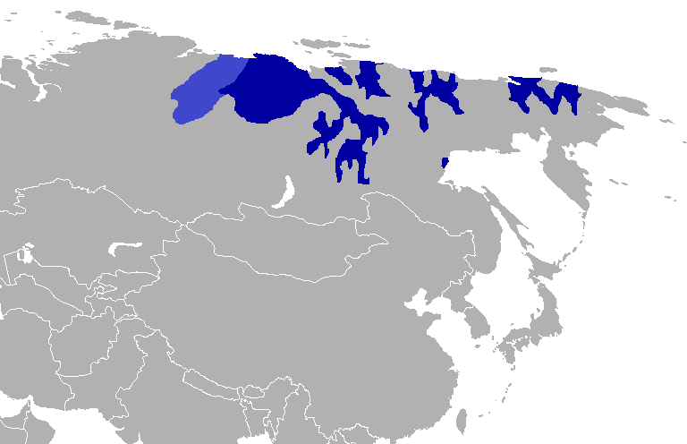 Lenguas siberianas septentrionales Idioma yakuto Idioma dolgan